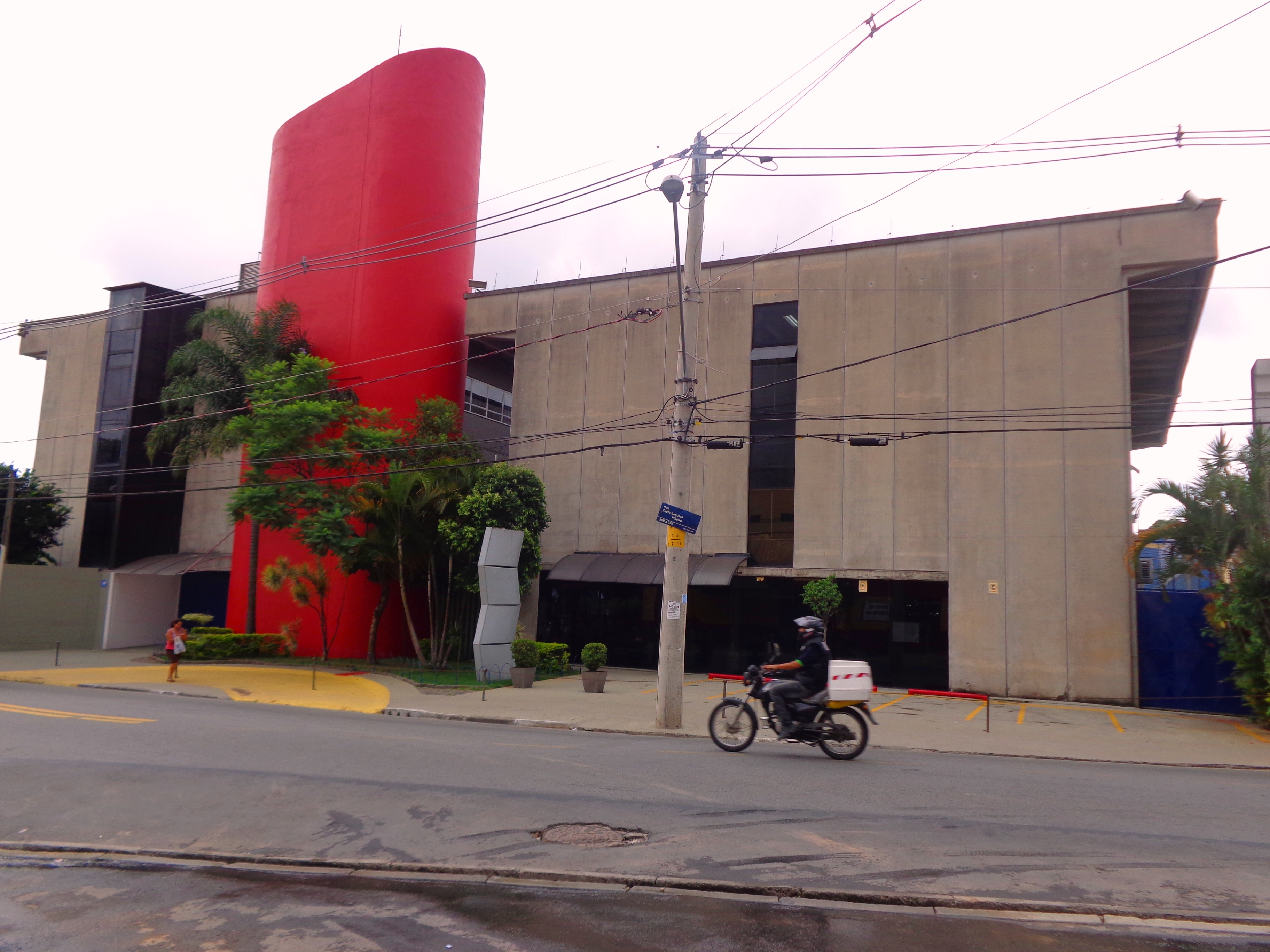 Colégio Palmerino Calabrez